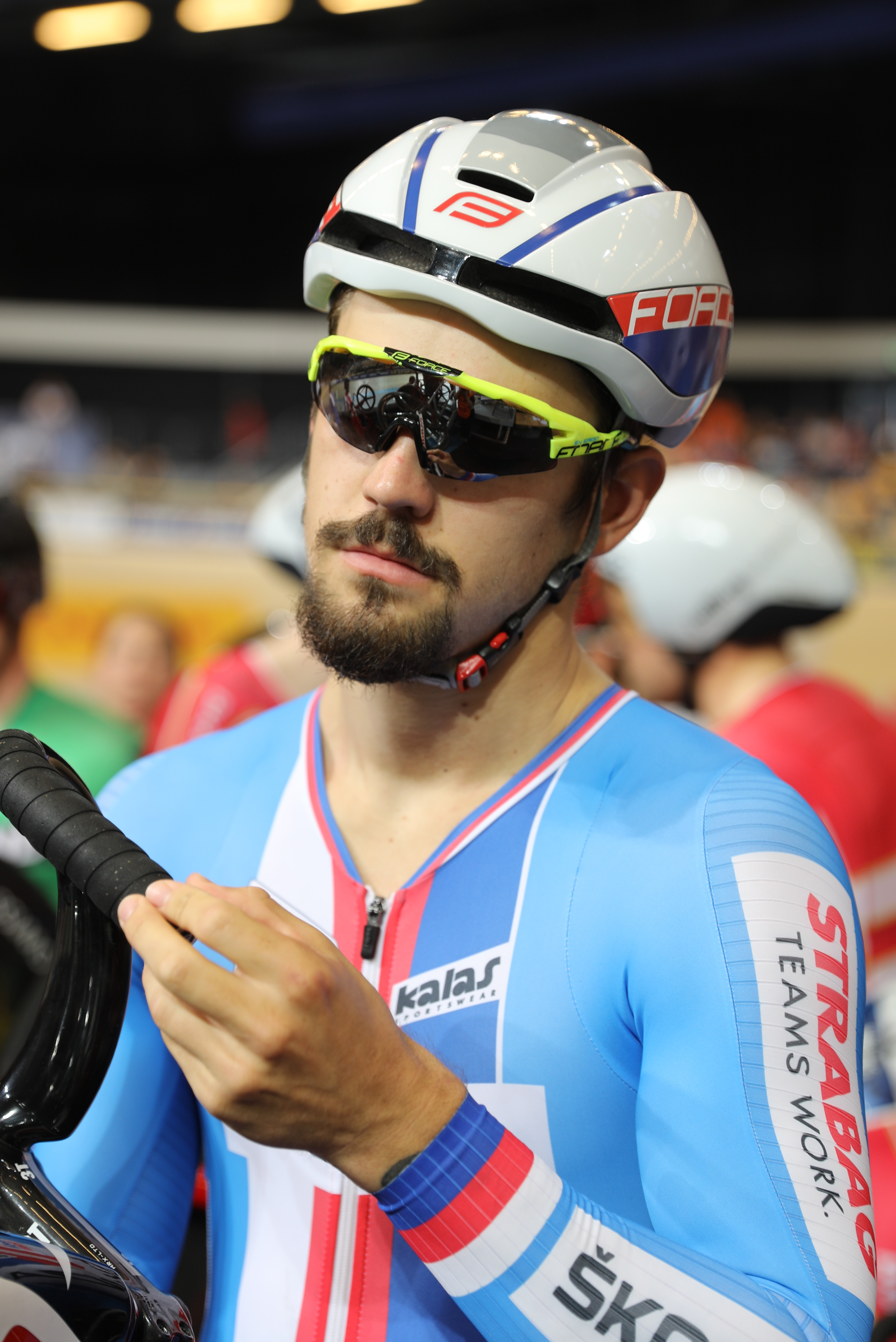 Daniel Babor, tschechischer Radsportler